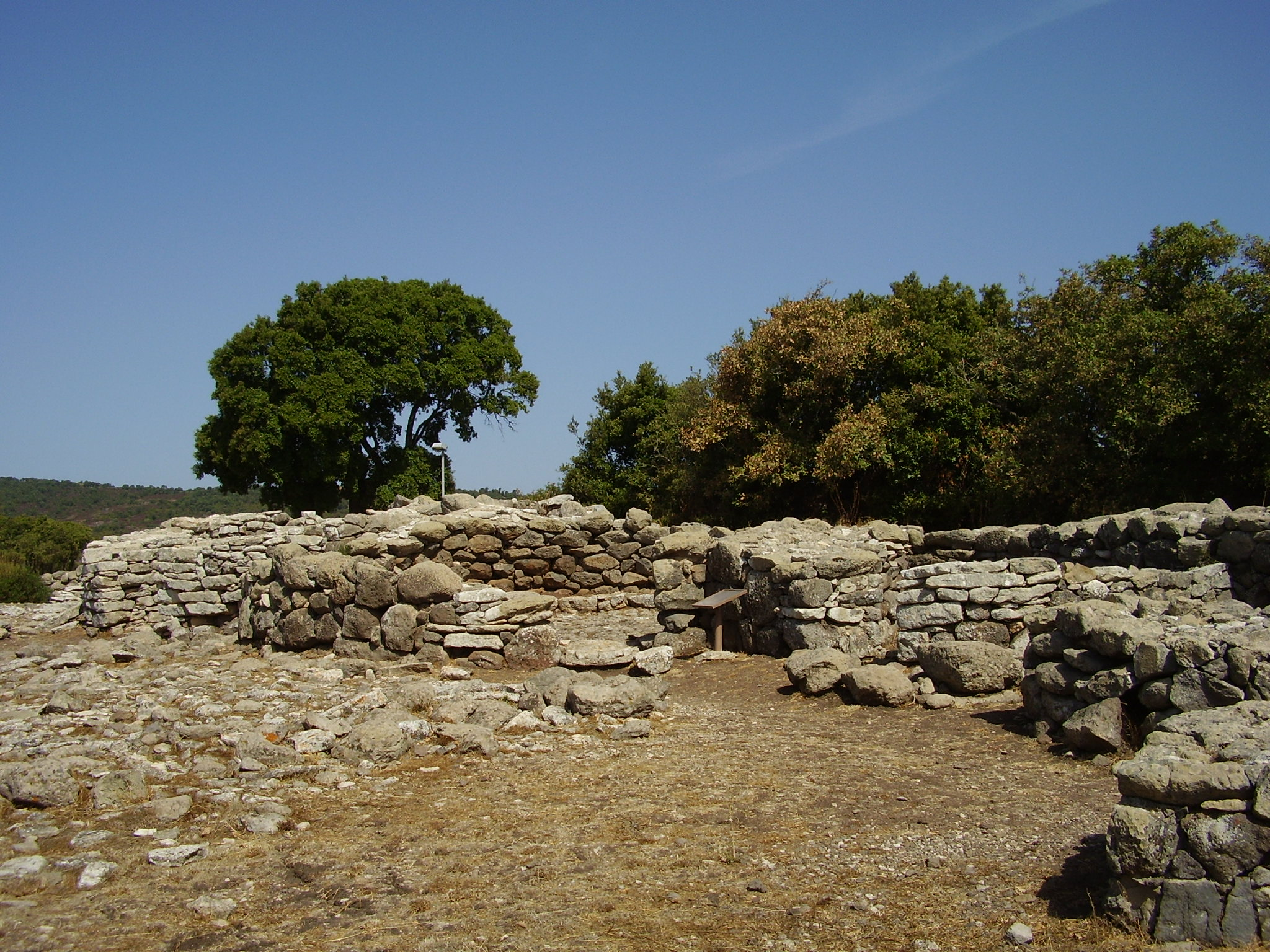 Santuario nuragico di Santa Vittoria - MIBAC This is a photo of a monument which is part of cultural heritage of Italy.